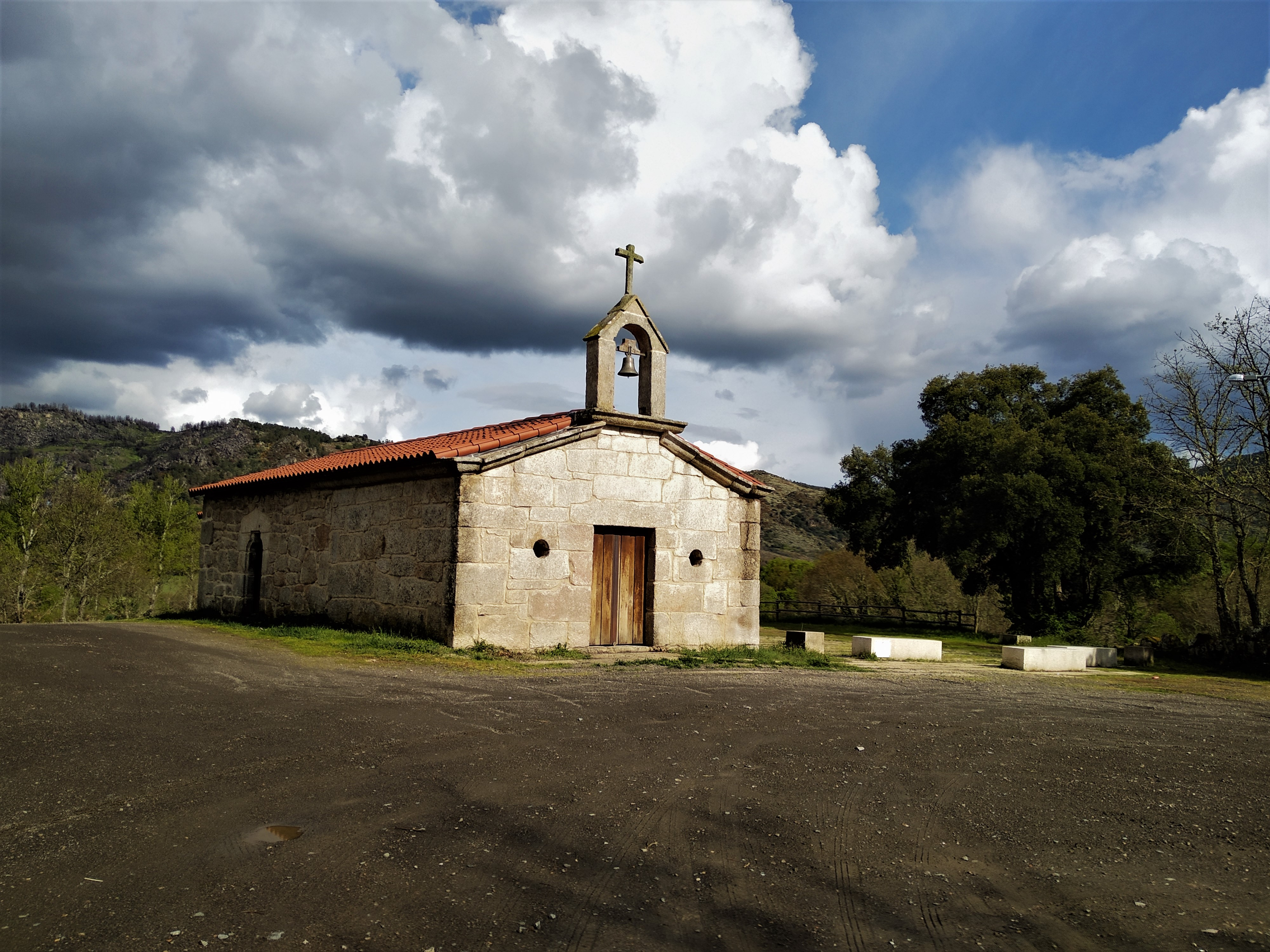 Capilla de San Antón